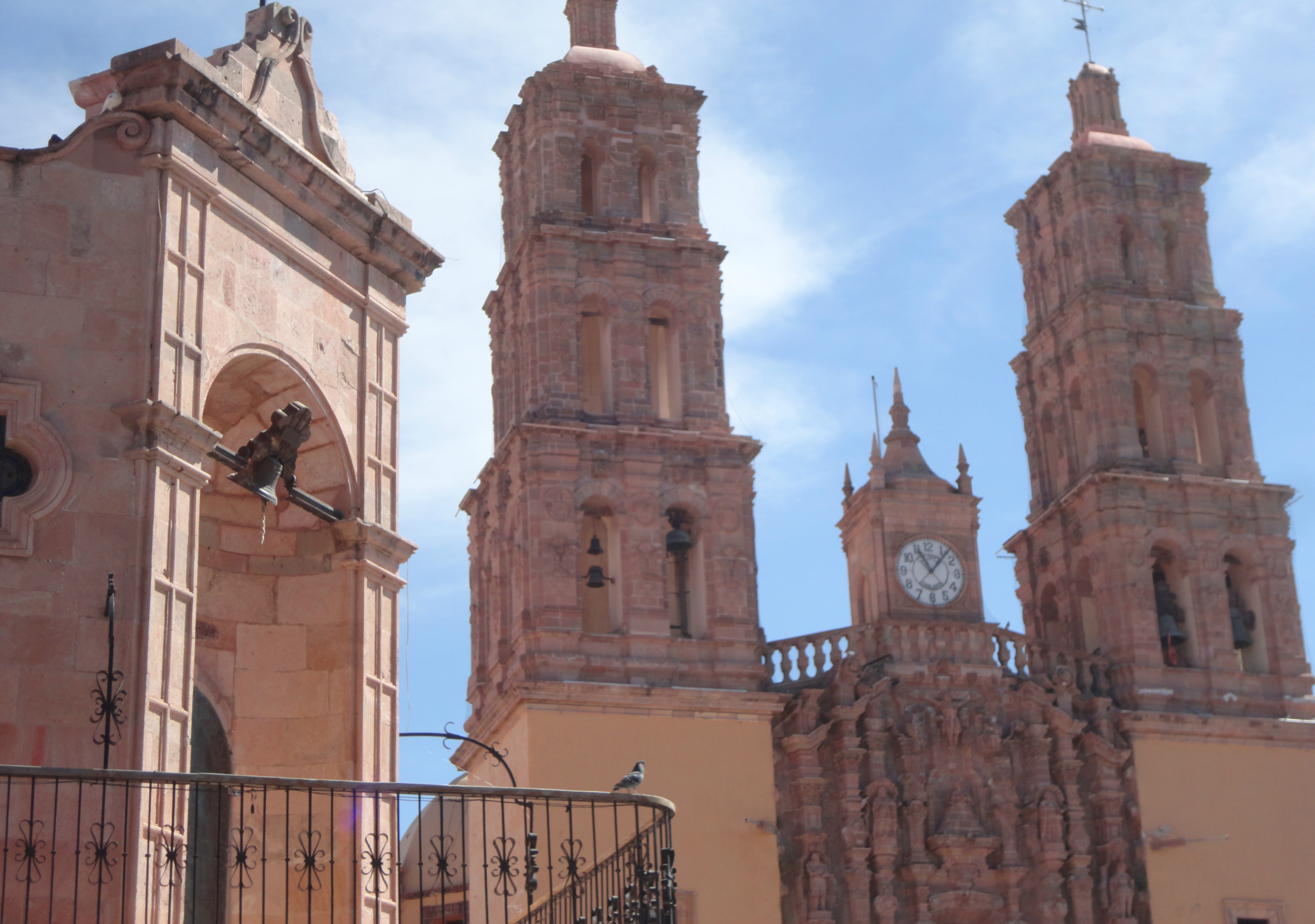 Arquitectura de Dolores Hidalgo, Guanajuato, México.